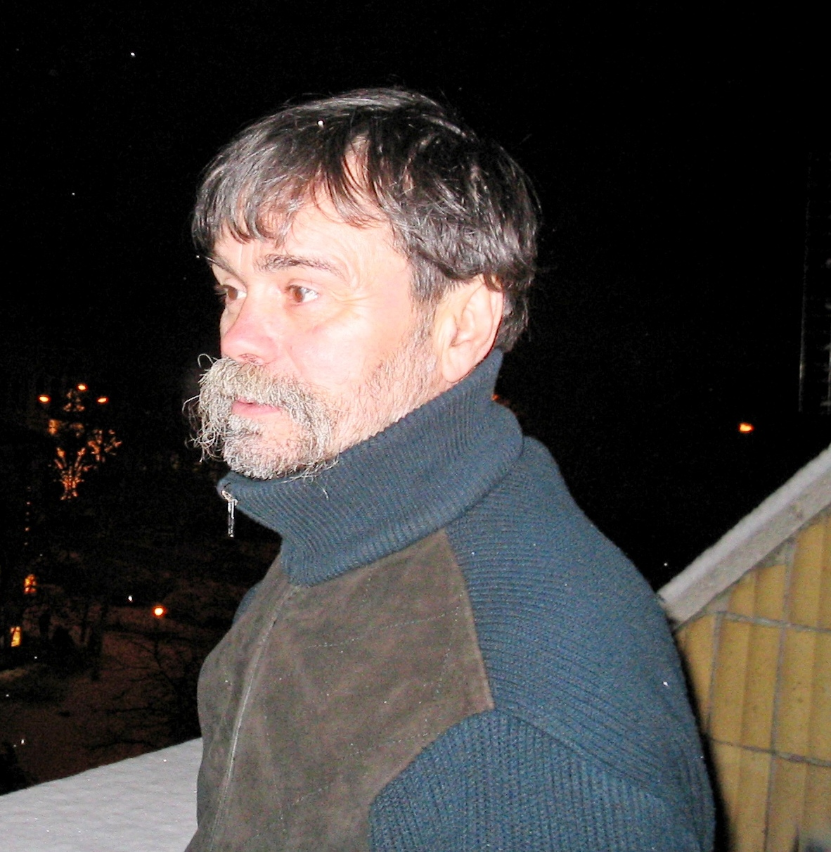 2005. december 22-én, a lakása (Békéscsaba, Andrássy út 2.) erkélyén készítettem a fényképet.